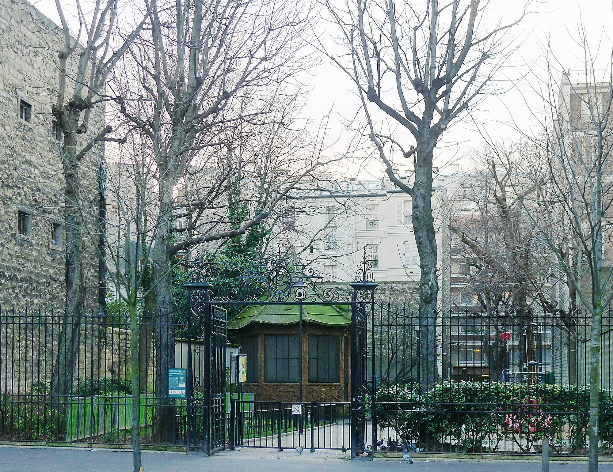 Square Paul-Gilot - Paris XV